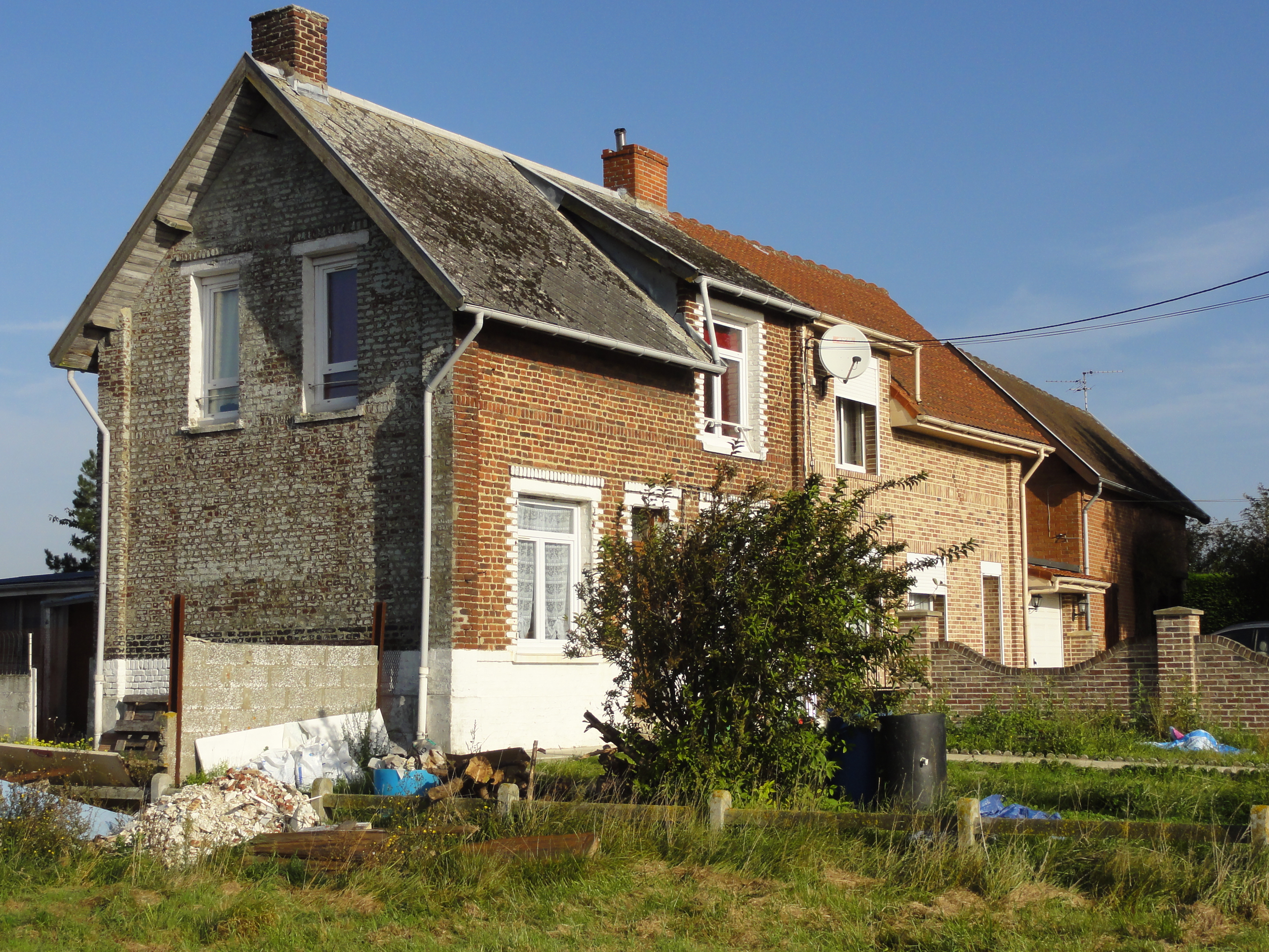 Cité de la fosse n° 4 bis de la Compagnie des mines de Béthune dans le bassin minier du Nord-Pas-de-Calais, Vermelles, Pas-de-Calais, Nord-Pas-de-Calais, France.